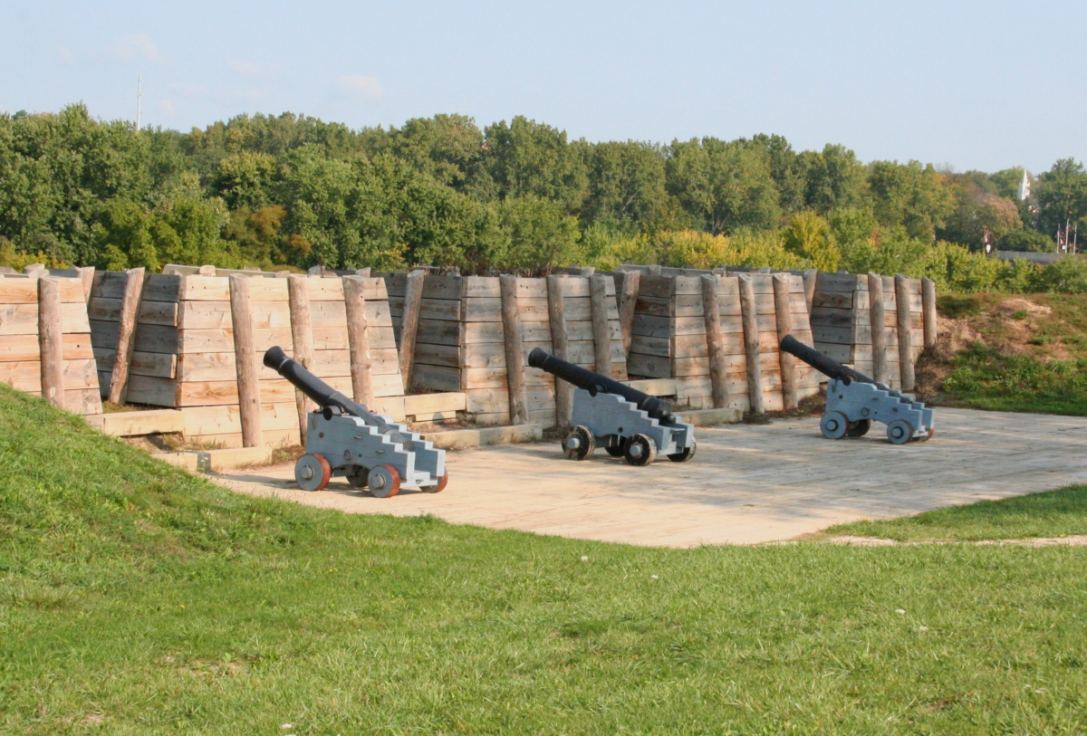 Fort Meigs